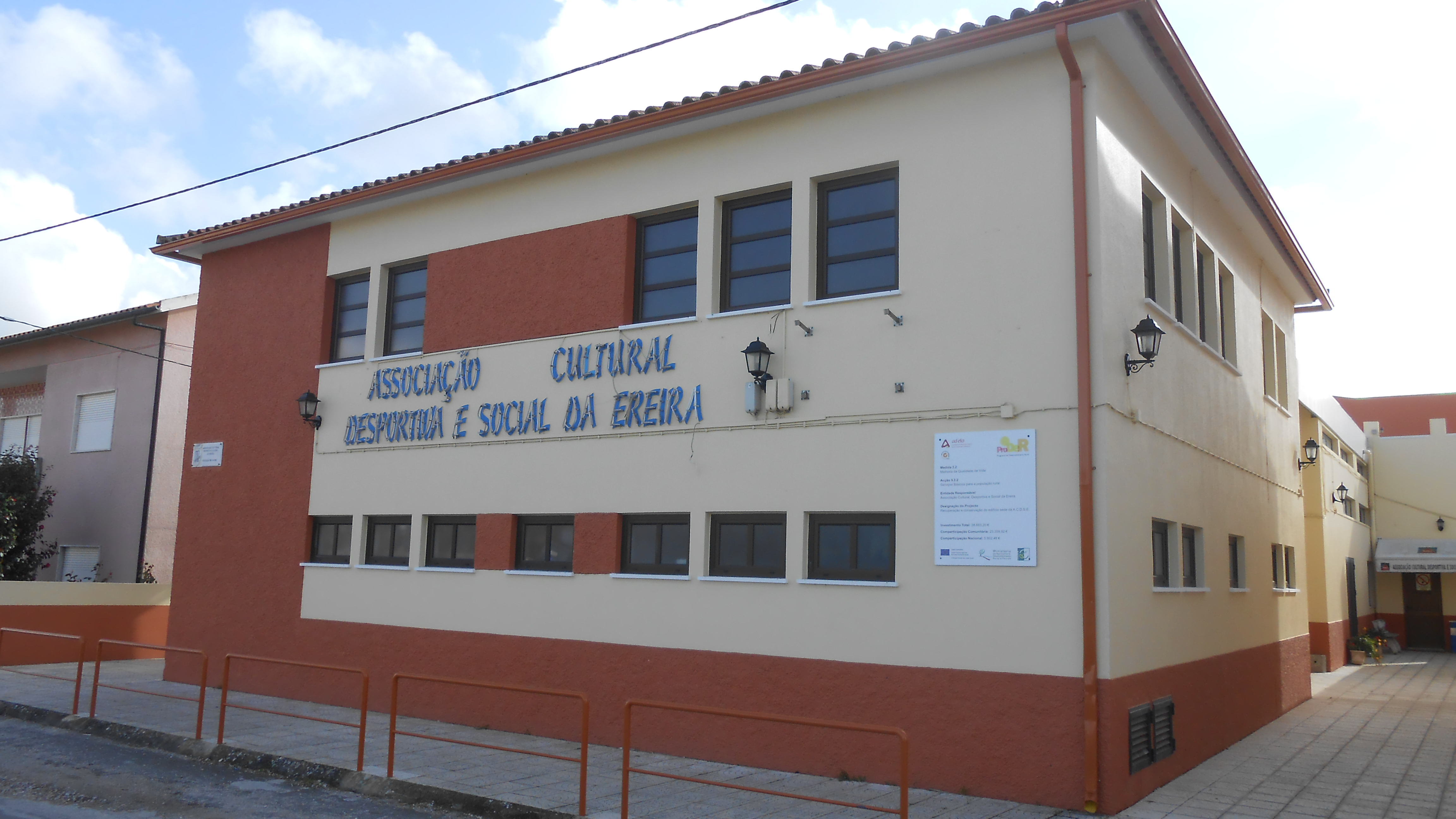 Das Gebäude der Associação Cultural, Desportiva e Social da Ereira (dt.: Verein für Kultur, Sport und Soziales von Ereira)